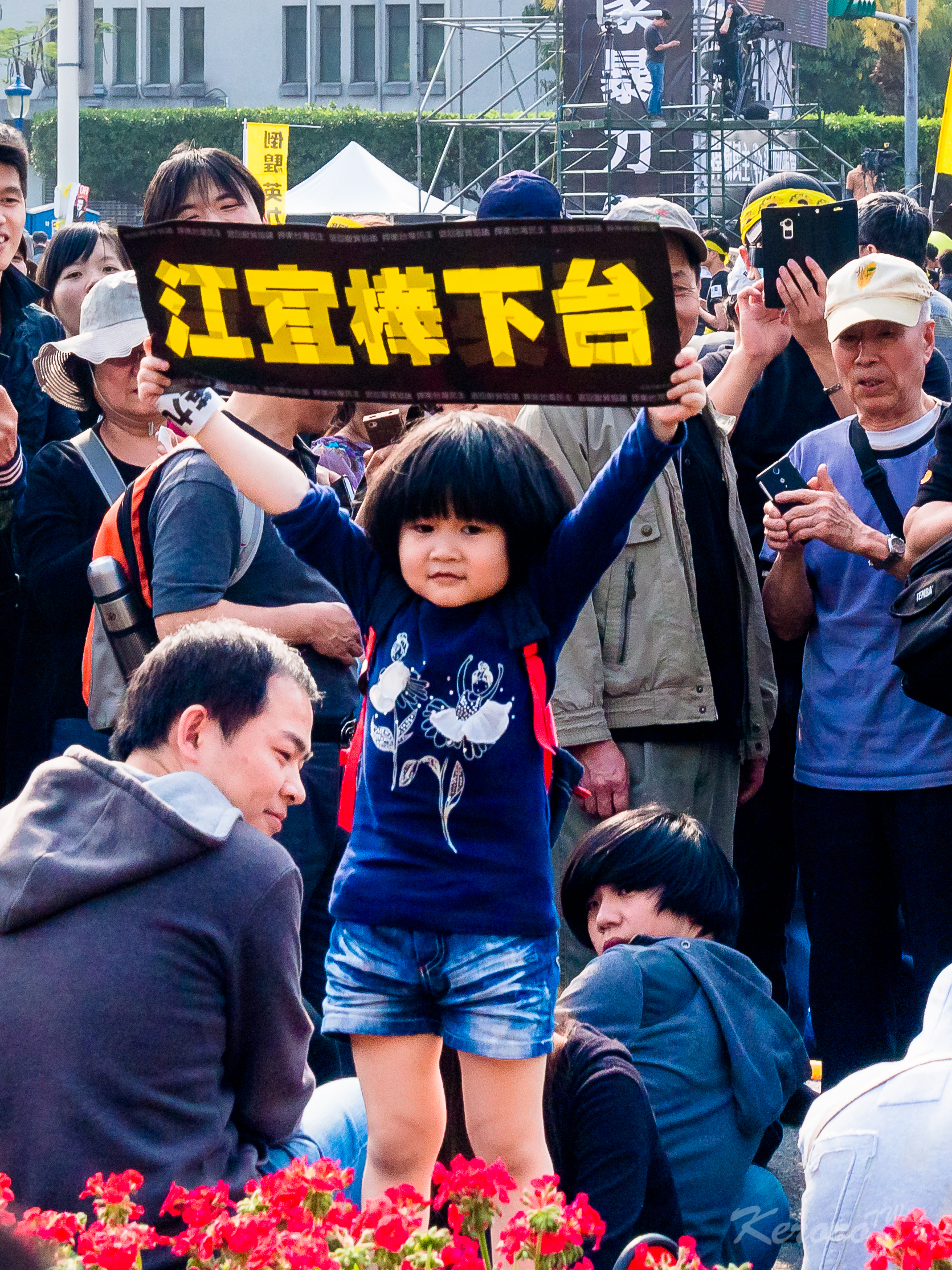 OLYMPUS DIGITAL CAMERA 2014-03-30 太陽花在凱道